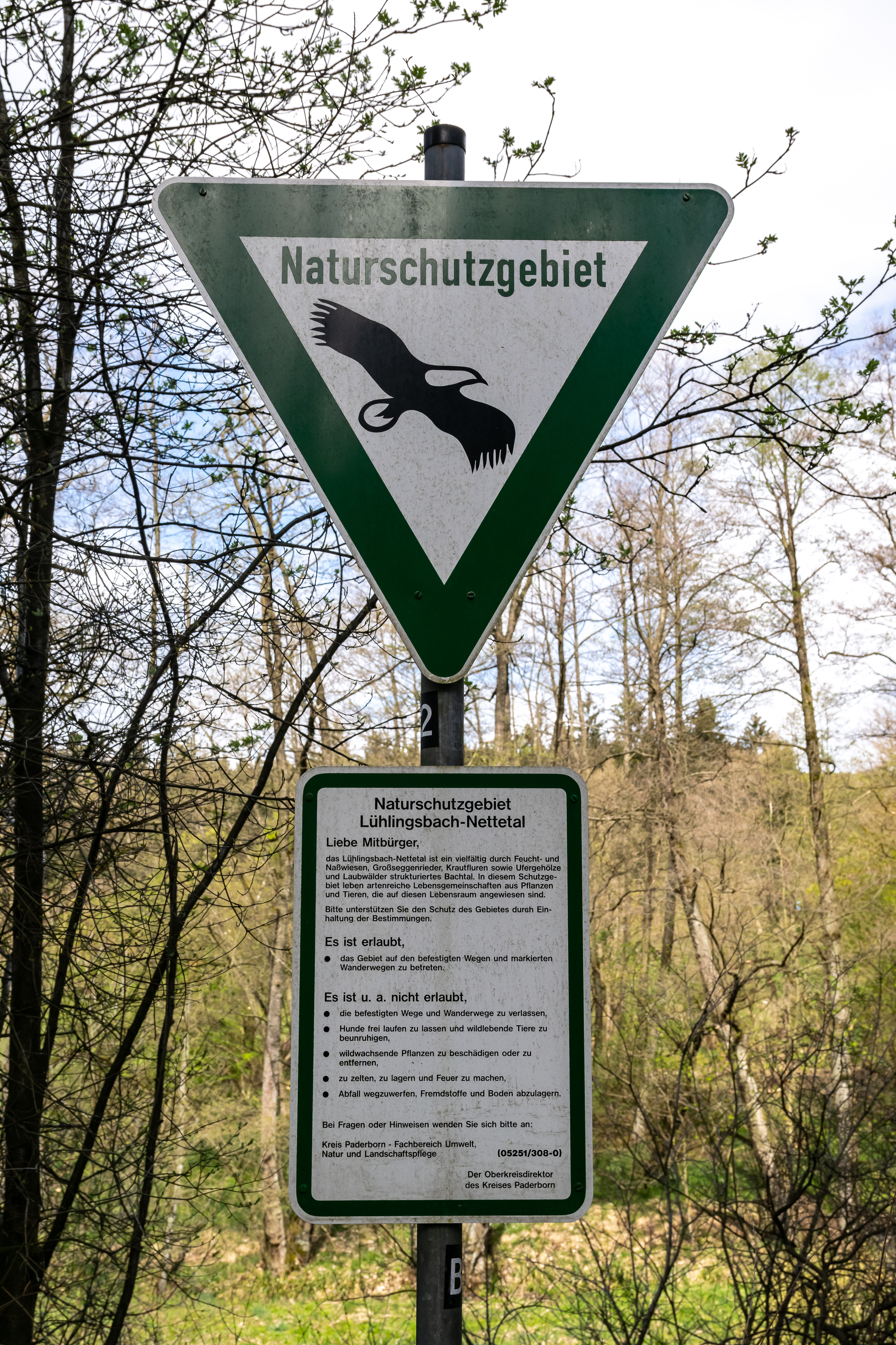 Infoschild Naturschutzgebiet Lühlingsbach-Nettetal in Bad Wünnenberg, Kreis Paderborn